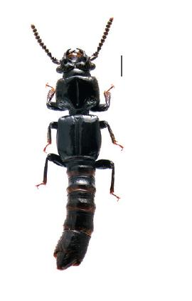 Plastus tuberculatus (scale bar = 1 mm)